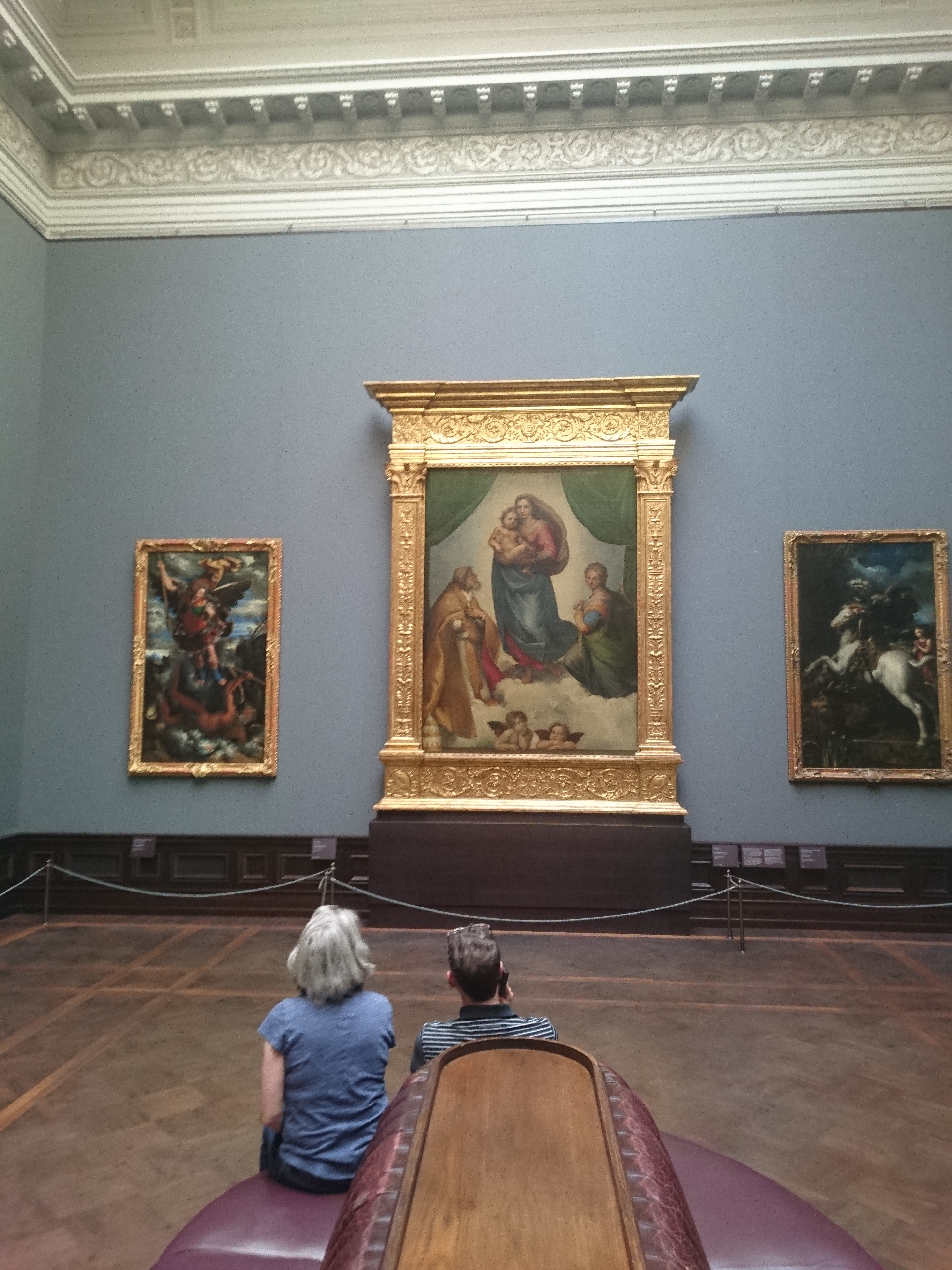 Սիքստինյան Տիրամայր